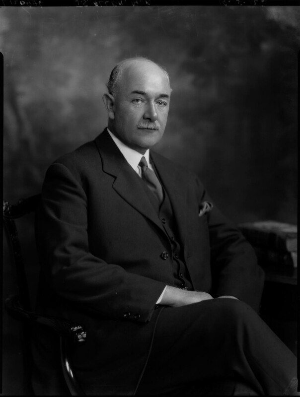 John Sandeman Allen